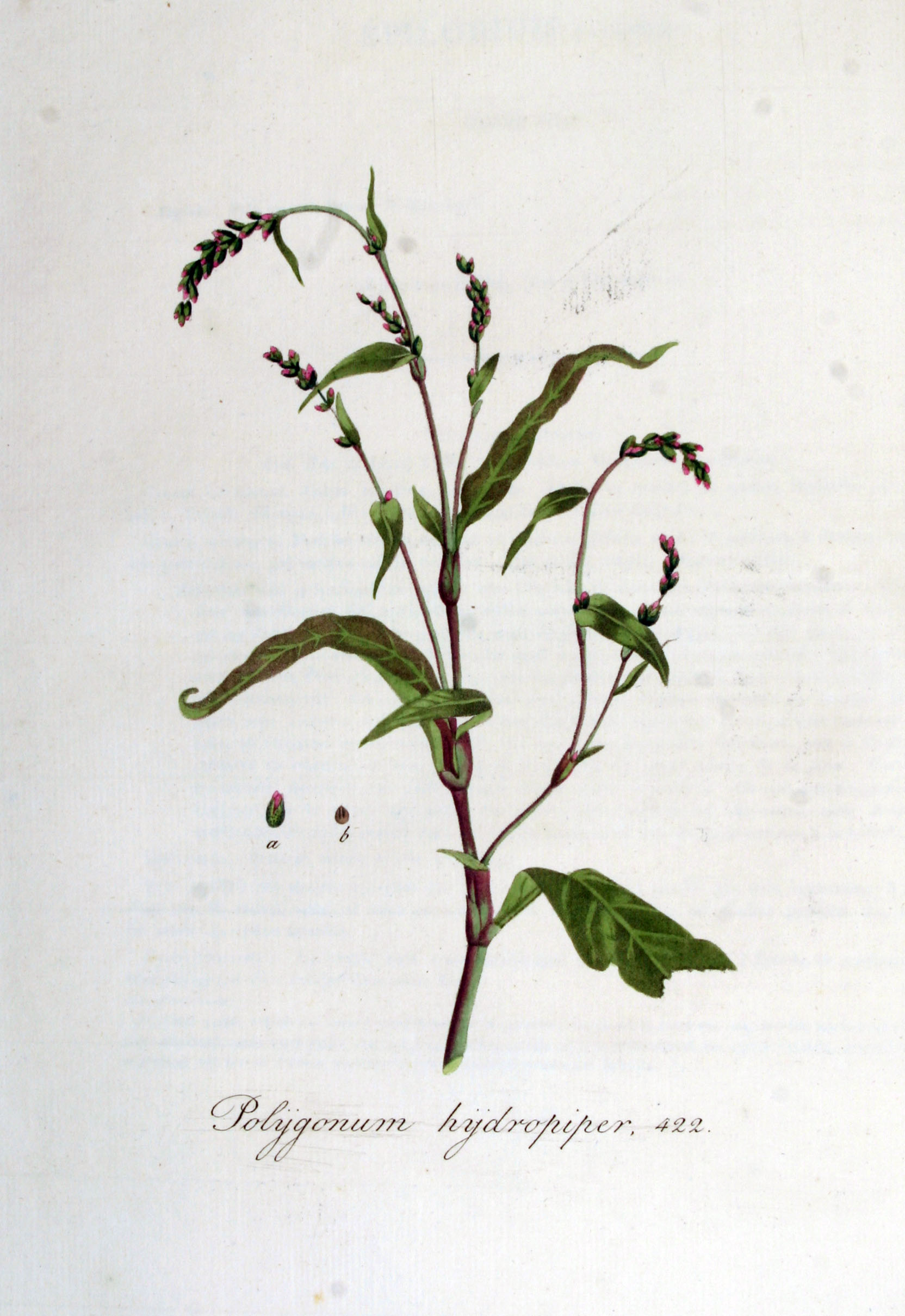 Persicaria hydropiper (L.) Spach (Syn. Polygonum hydropiper L.)